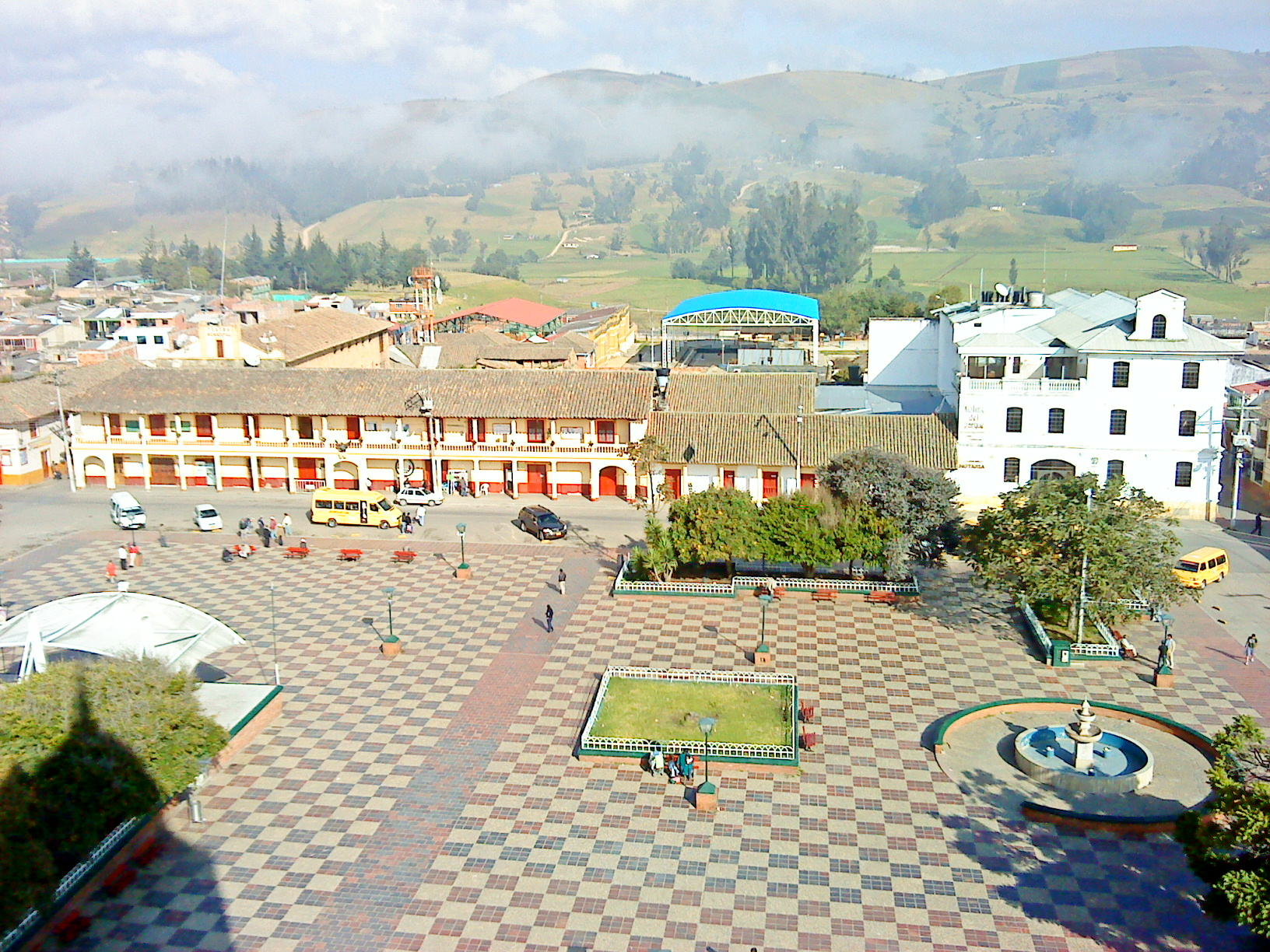 Vista Panorámica del Parque Principal de Chocontá (Cundinamarca)